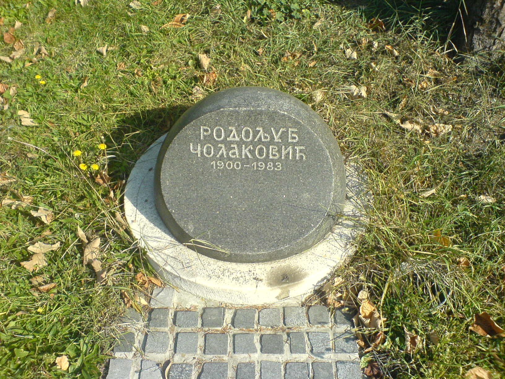 Grob Rodoljuba Čolakovića.